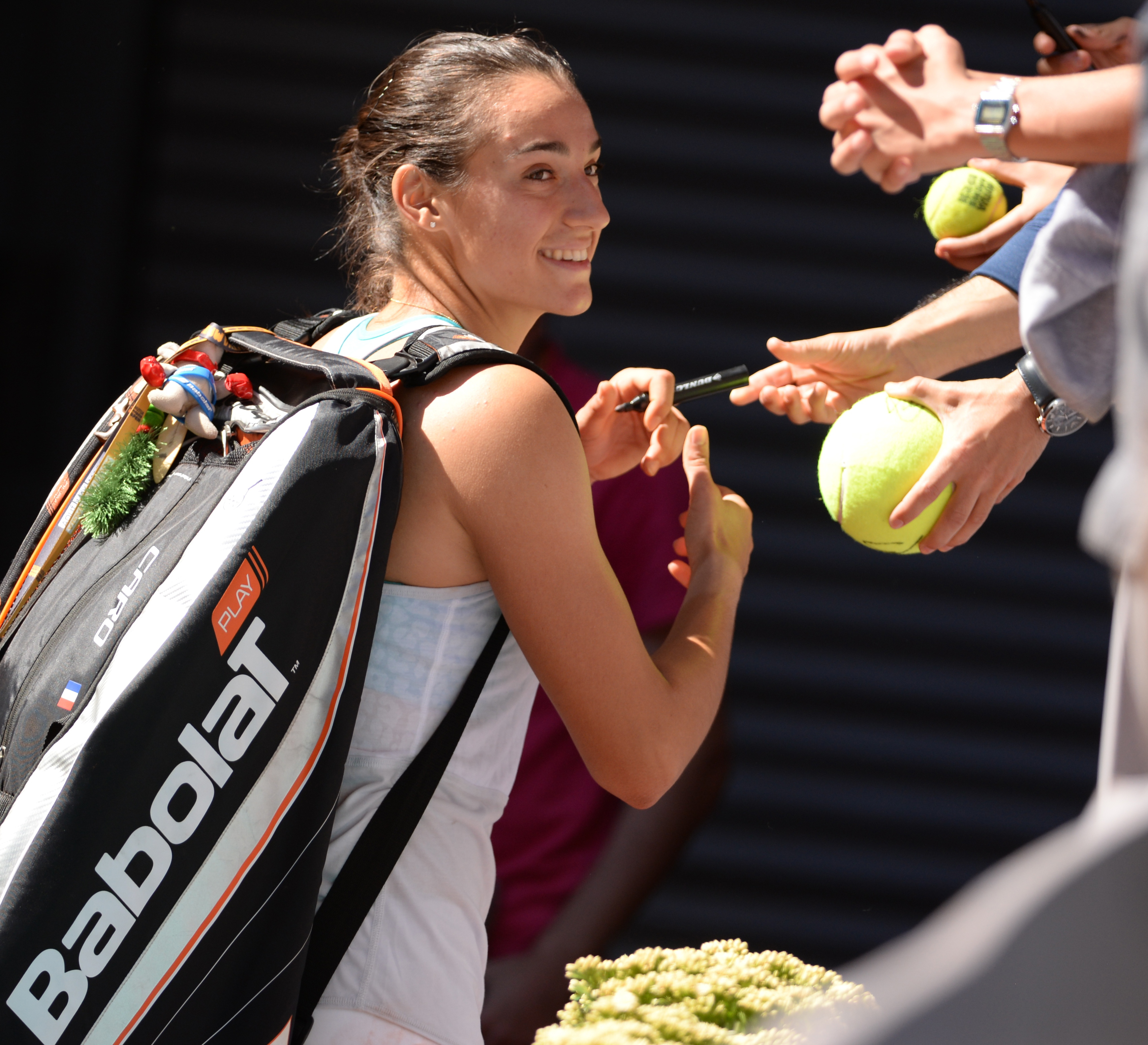 Caroline Garcia